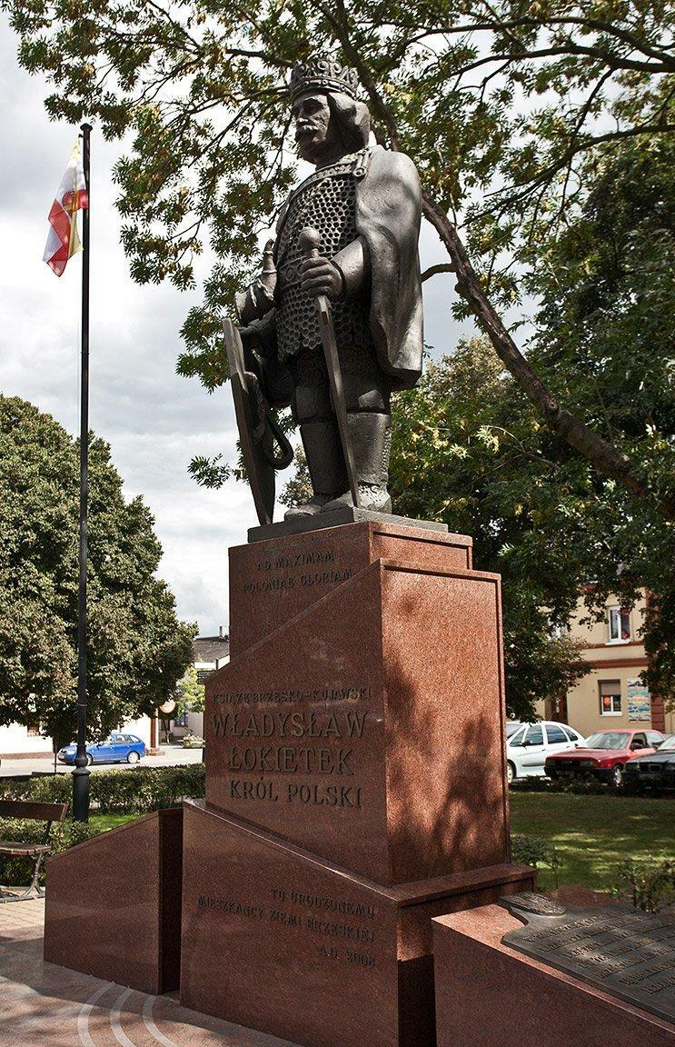 Pomnik króla Władysława Łokietka. Trudny do sfocenia, bo w tle korony drzew.